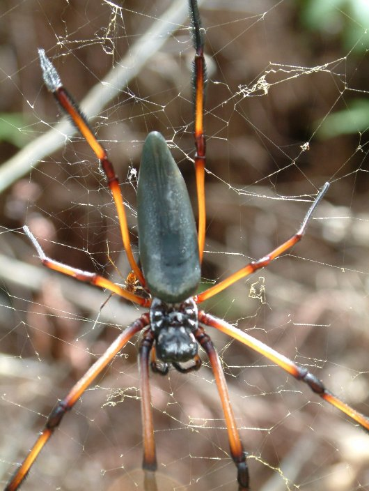 Seidenspinne (vork.: Afrika, Indischer Ozean) Bildquelle: Privatfoto Esskay